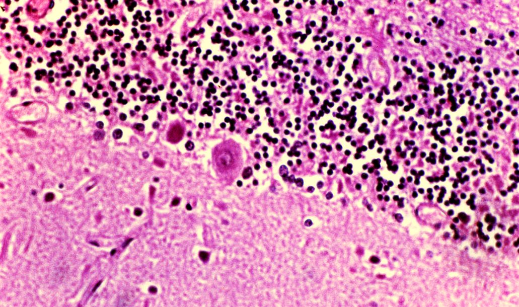 Pèrdua de les cèl•lules de Purkinje al cerebel en un cas d'hipòxia cerebral